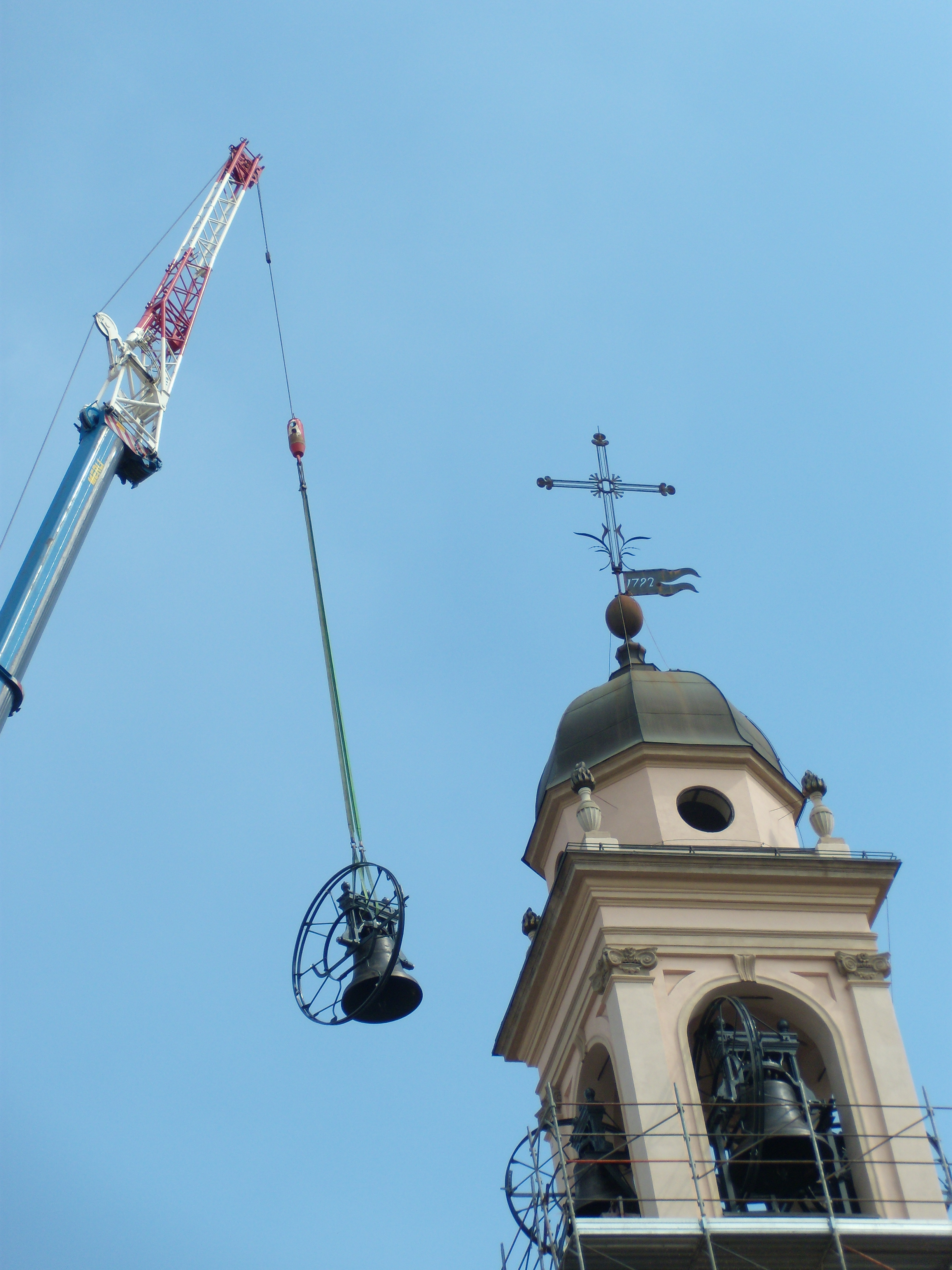 Il montaggio delle campane dopo il restauro, nel campanile della Chiesa di Sant'Ambrogio a Cinisello Balsamo